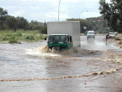 Klein Windhoek River